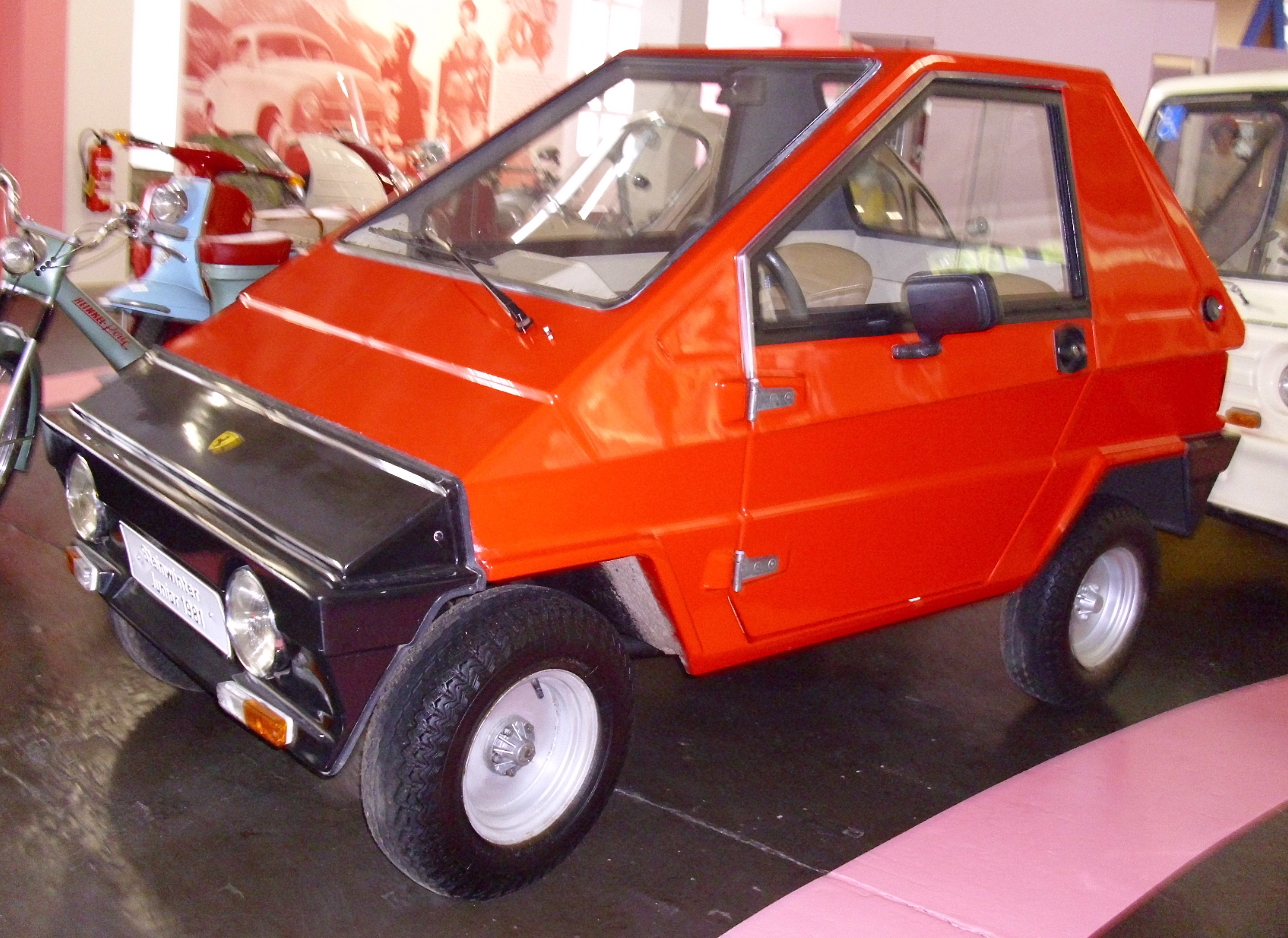 Steinwinter Junior 50 1981